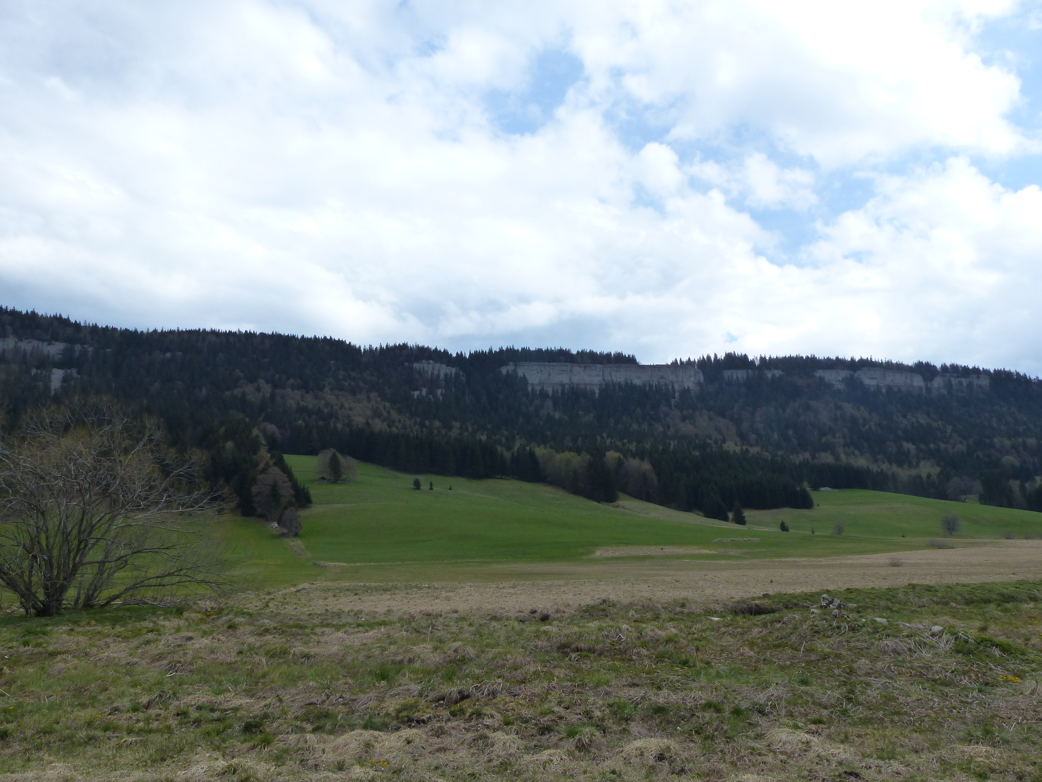 Vue de Roche Champion (Mont Risoux) depuis Chapelle-des-Bois (Doubs, France)